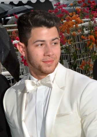 Nick Jonas au Festival de Cannes 2019.